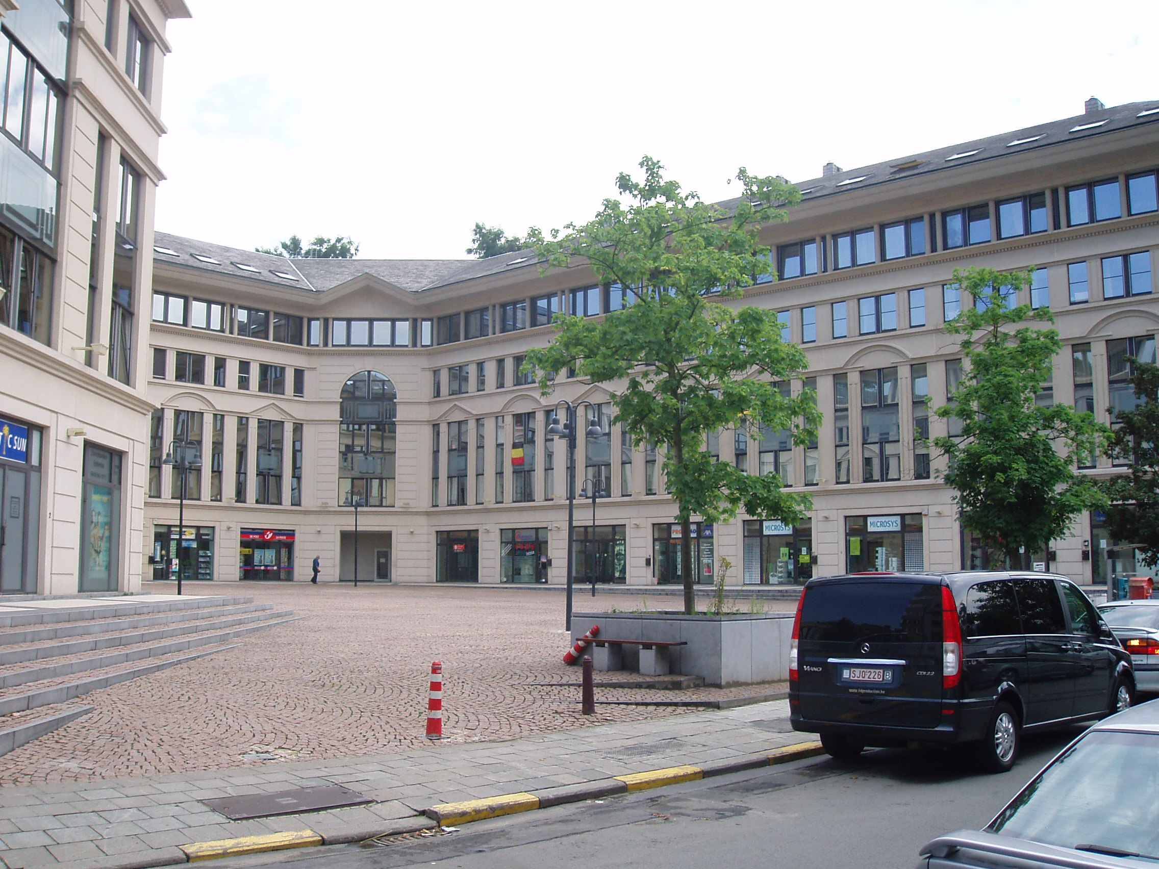 place communale d'Auderghem Belgium